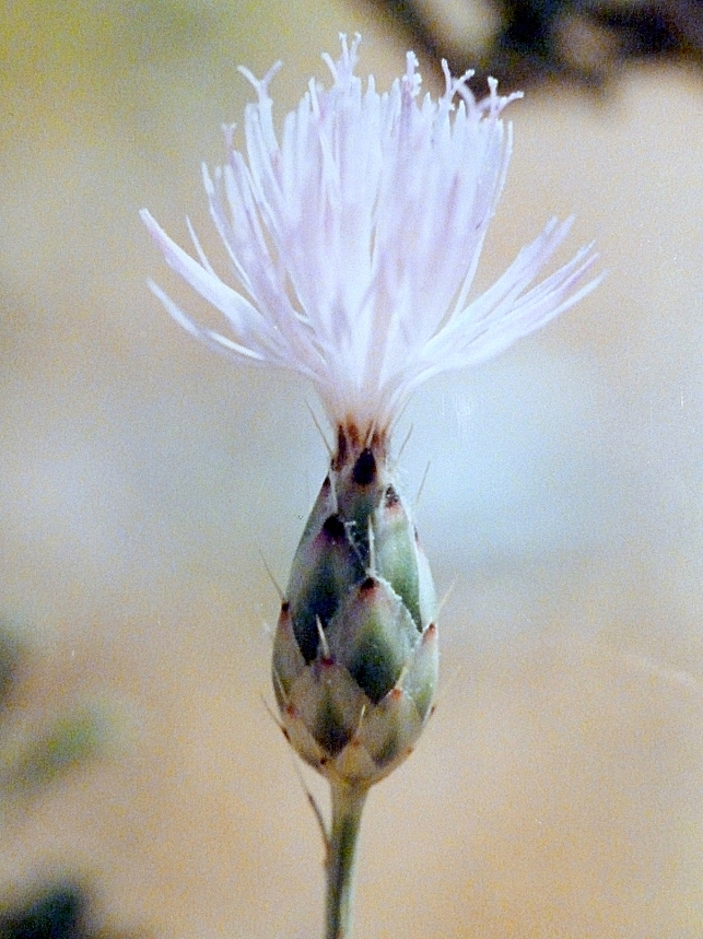 Mantisalca duriaei - Colonia Llorente, La Abubilla, circa Coslada (Madrid, España).